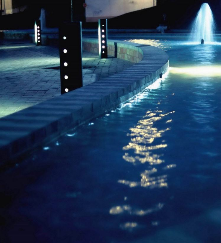 Estanque